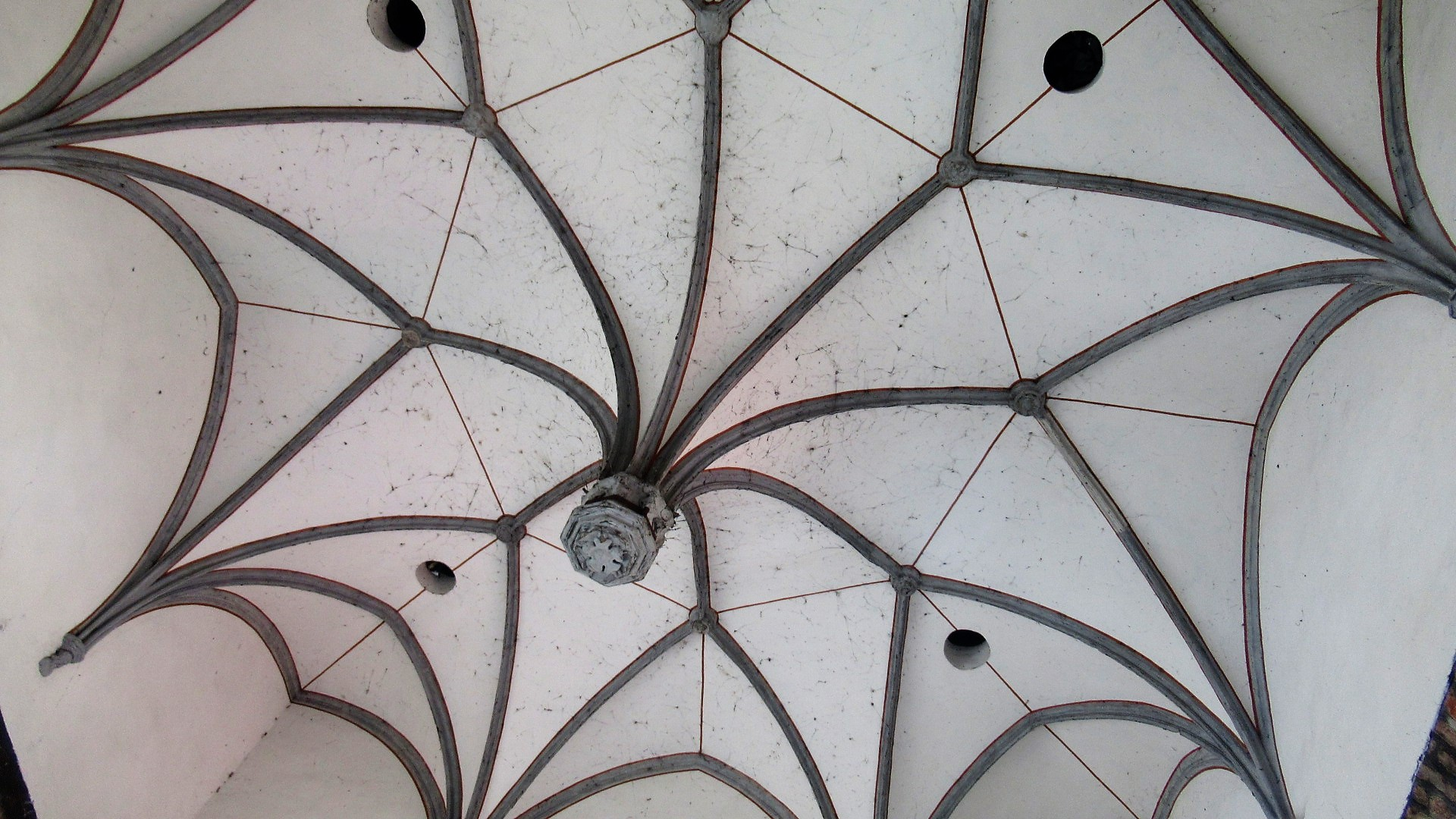 Augsburg-Jakobervorstadt: Turm des Vogeltors – Detail: Sternrippengewölbe über der offenen Durchfahrt; mittig der große, hängende Schlussstein mit Rosette.